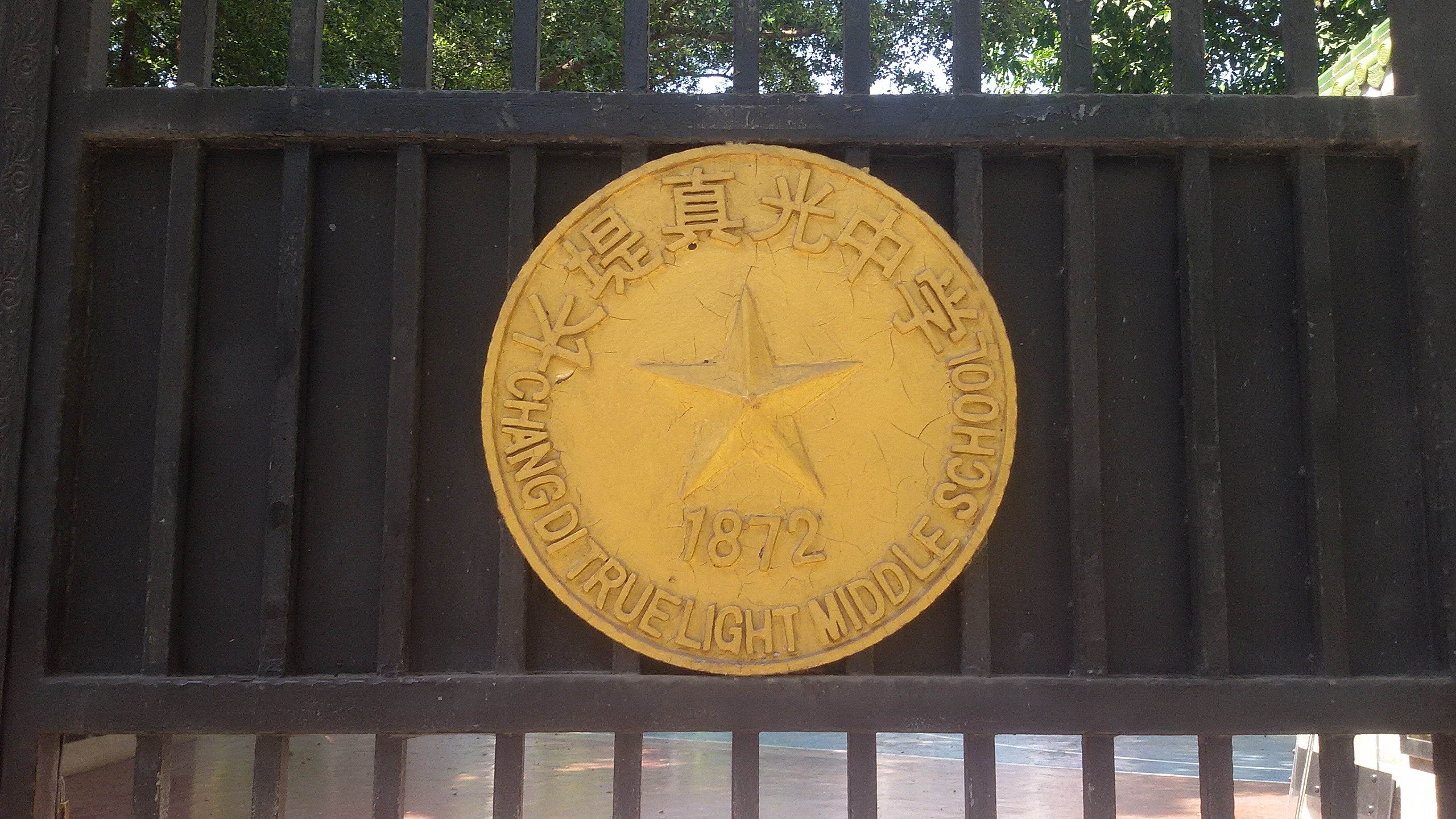 粵語: 長堤真光中學嘅學校撈稿（學校門口嗰嚿）